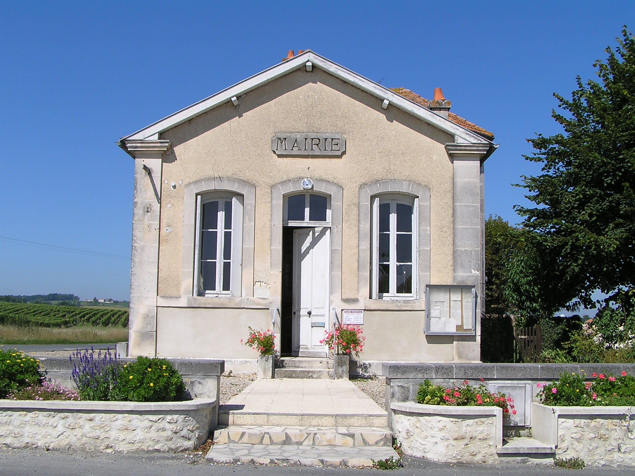 mairie d'Eraville